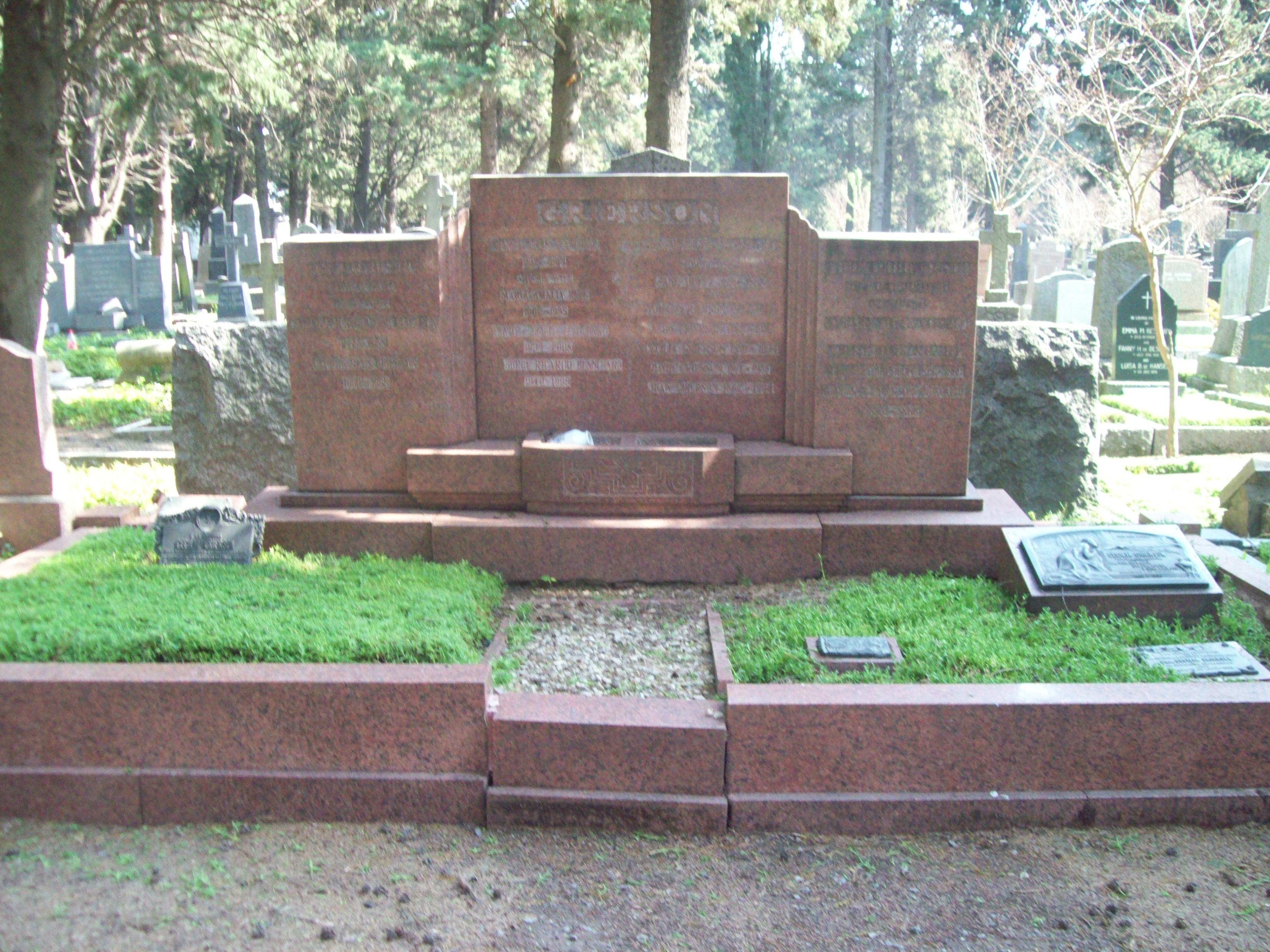 Sepulcro de Cecilia Grierson